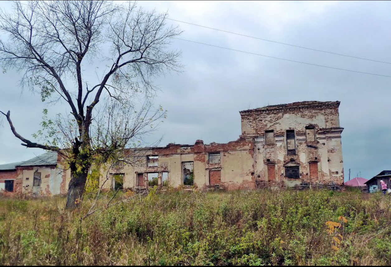 храм в скате